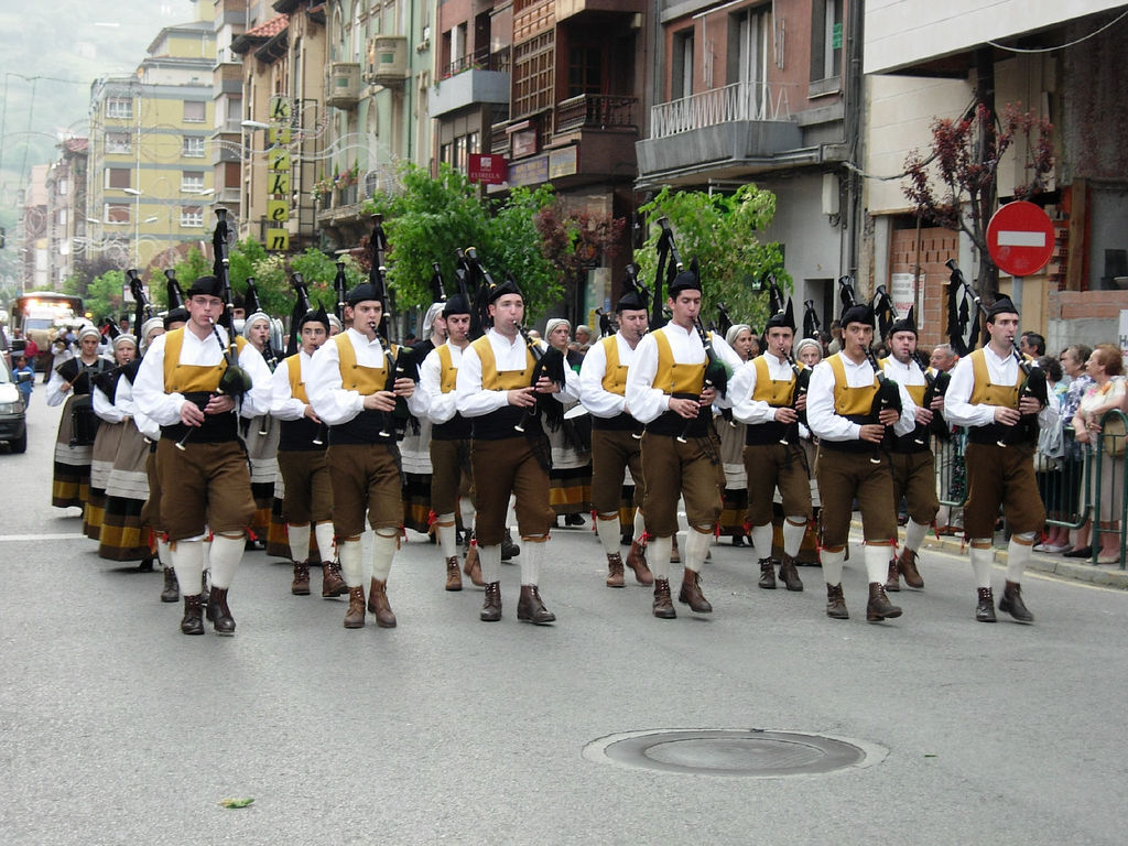 Desfilando peles cais Desfilando por las calles.